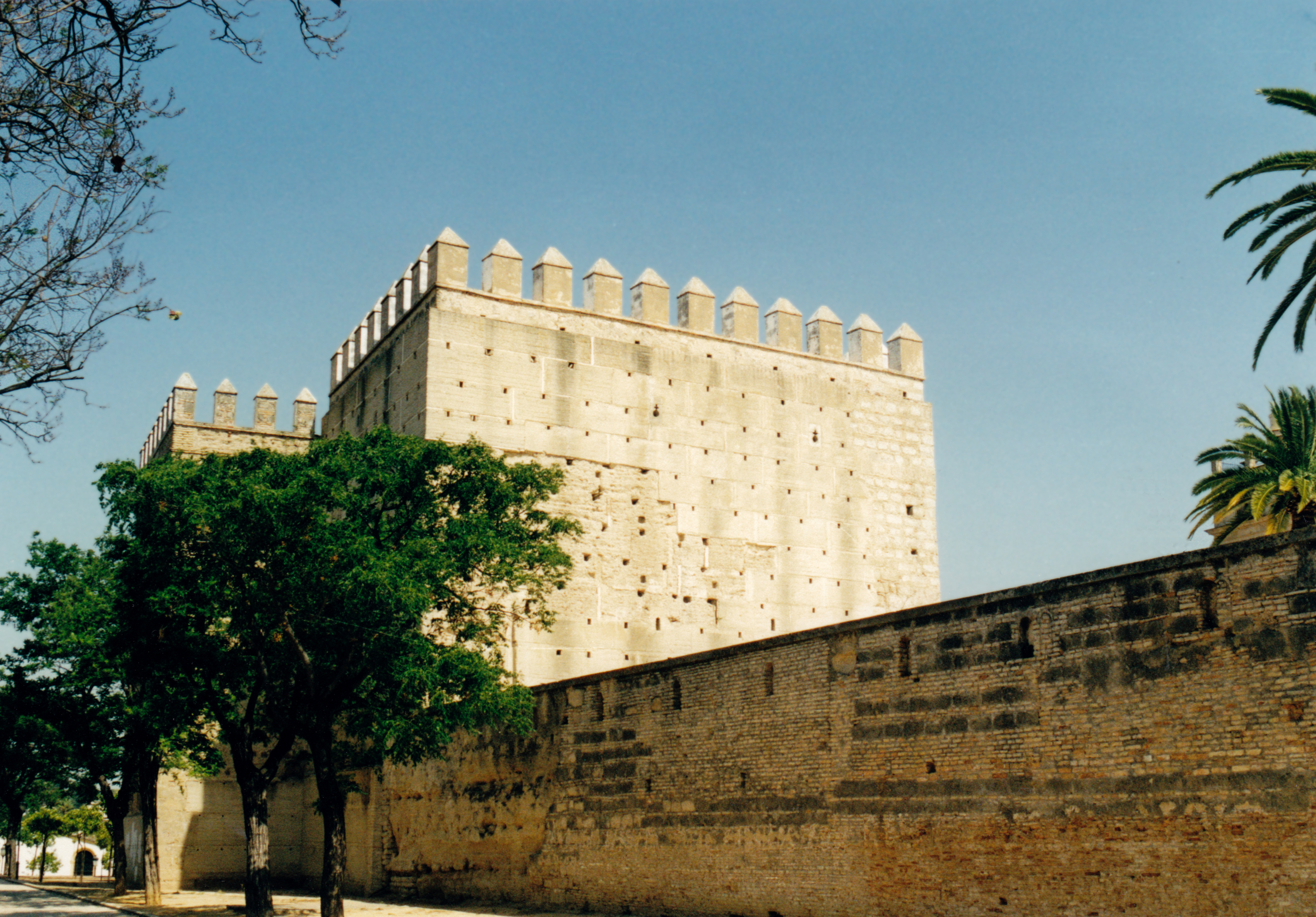 Espagne - Jerez de la Frontera - Alcazar almohade